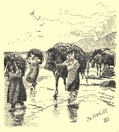 картины британской художницы-баталиста Элизабет Томпсон